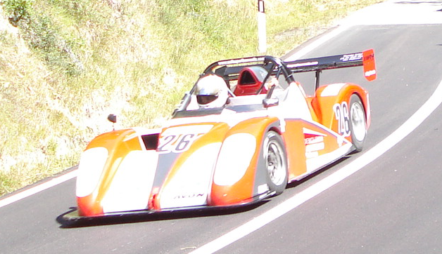 Fase di gara